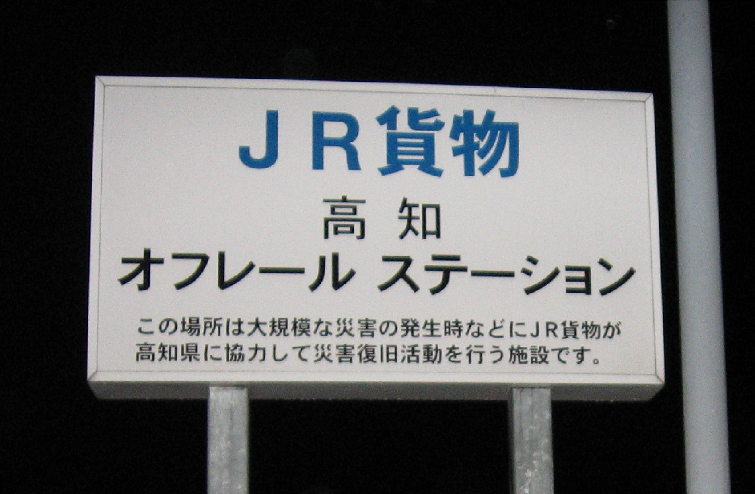 高知県高知市内の、JR貨物高知オフレール・ステーション沿いの公道に表示された案内図。 この施設はいずれ起こるとされている 「 東南海地震 」 に対応して、有事の際には救援物資等の集配拠点や災害復旧活動に対応出来るように、地元自治体と協定を結んでいる。 この様なORS施設は珍しい。